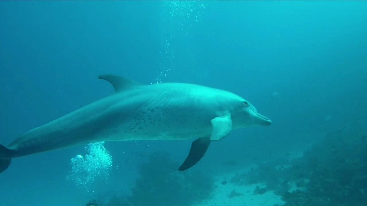 Un jeune dauphin solitaire vient jouer avec nous